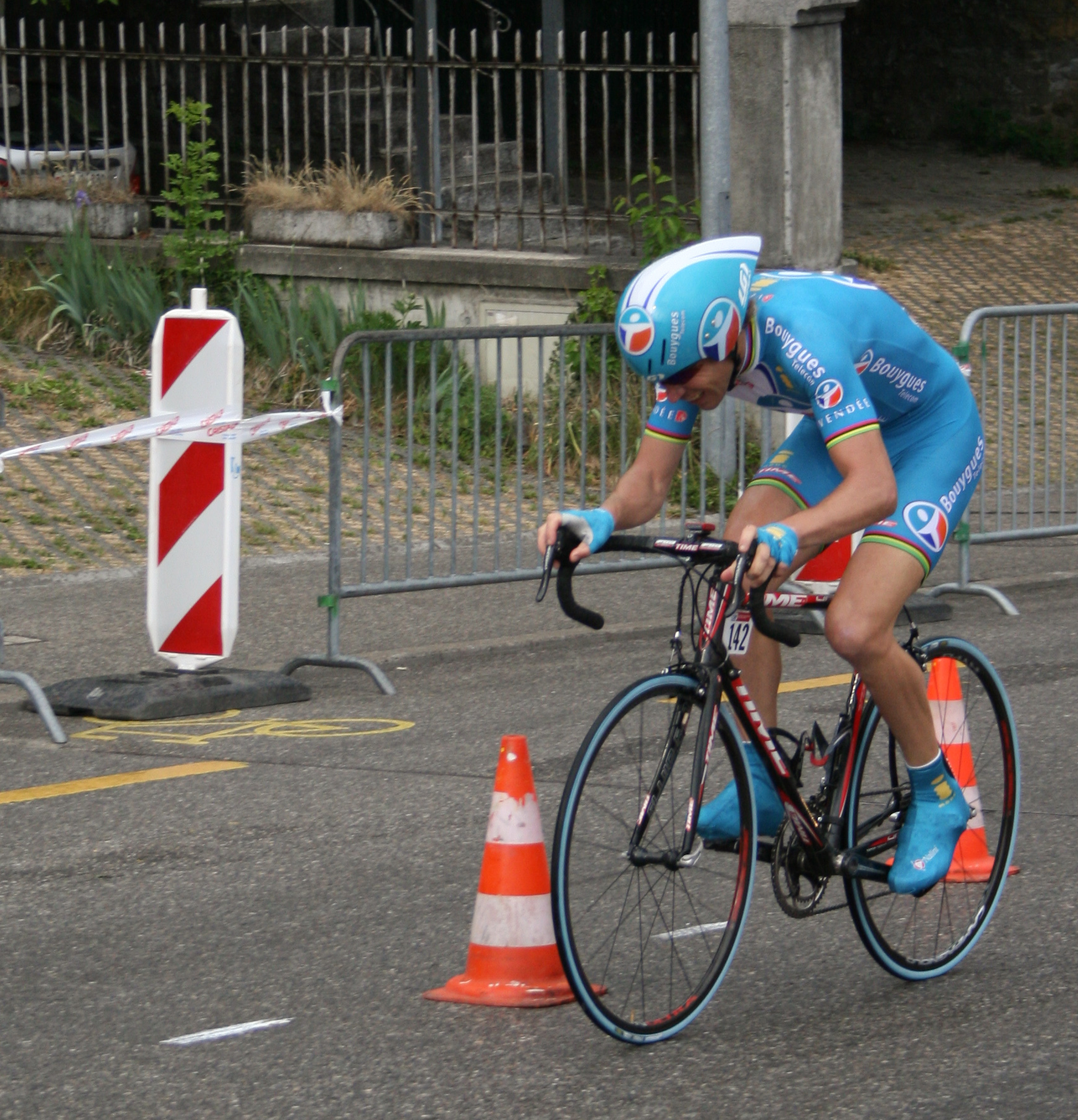 Laurent Brochard prologue du Tour de Romandie 2007